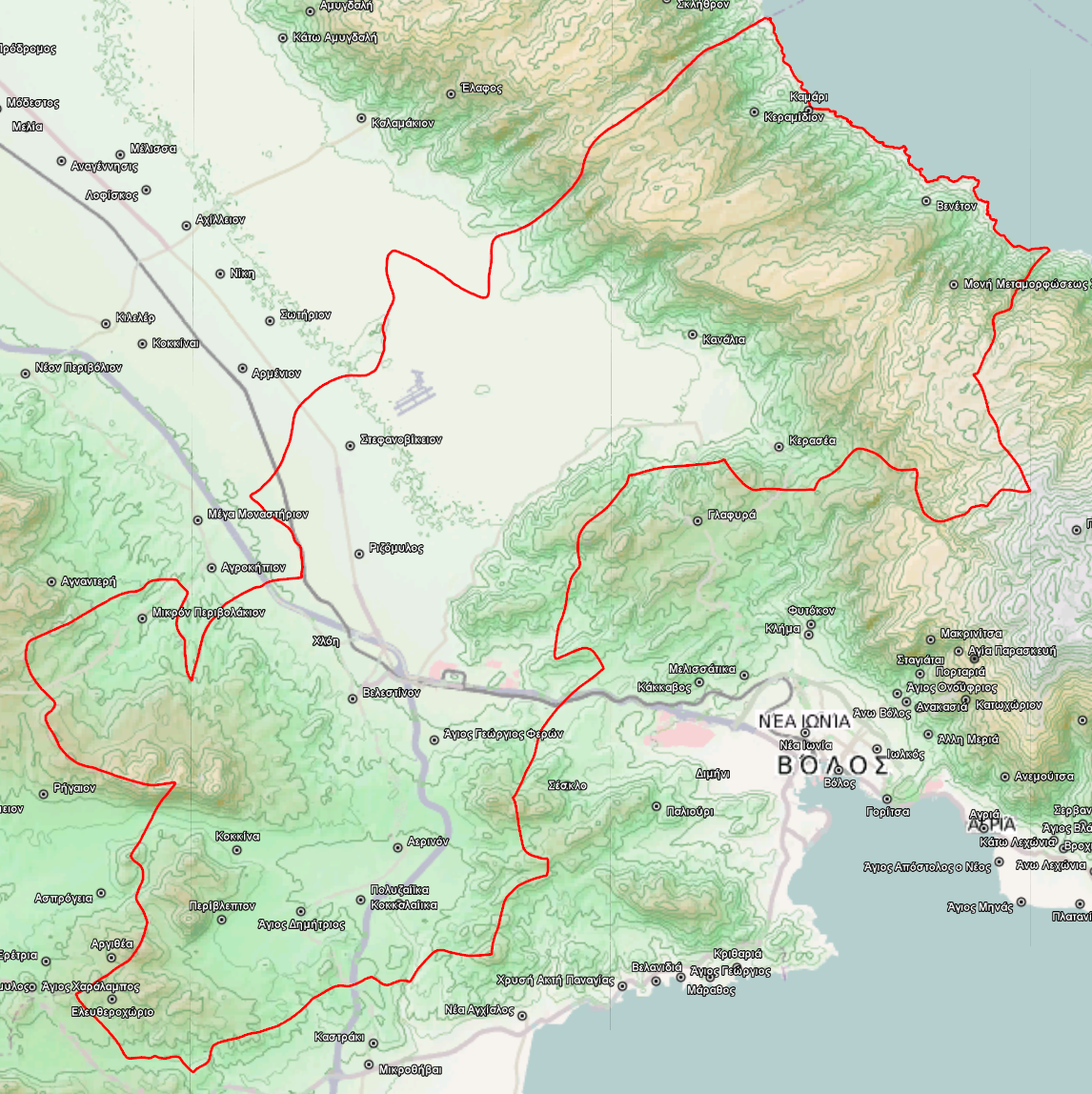 Τοπογραφικός χάρτης του Δήμου Ρήγα Φεραίου